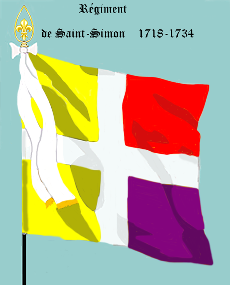 Ordonnanzfahne eines königlich französischen Infanterie-Regiments. - Entnommen und überarbeitet aus: „LES UNIFORMES ET LES DRAPEAUX DE L'ARMÉE DU ROI“ Marseille 1899. (Drapeau d'ordonnance d' un régiment française d'infanterie royale.)